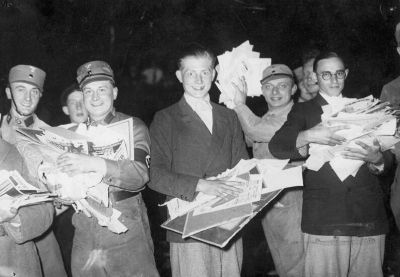 Die öffentliche Verbrennung undeutscher Schriften und Bücher auf dem Opernplatz in Berlin! Studenten und Nationalsozialisten mit undeutschen Büchern und Schriften am Verbrennungsplatz Unter den Linden.